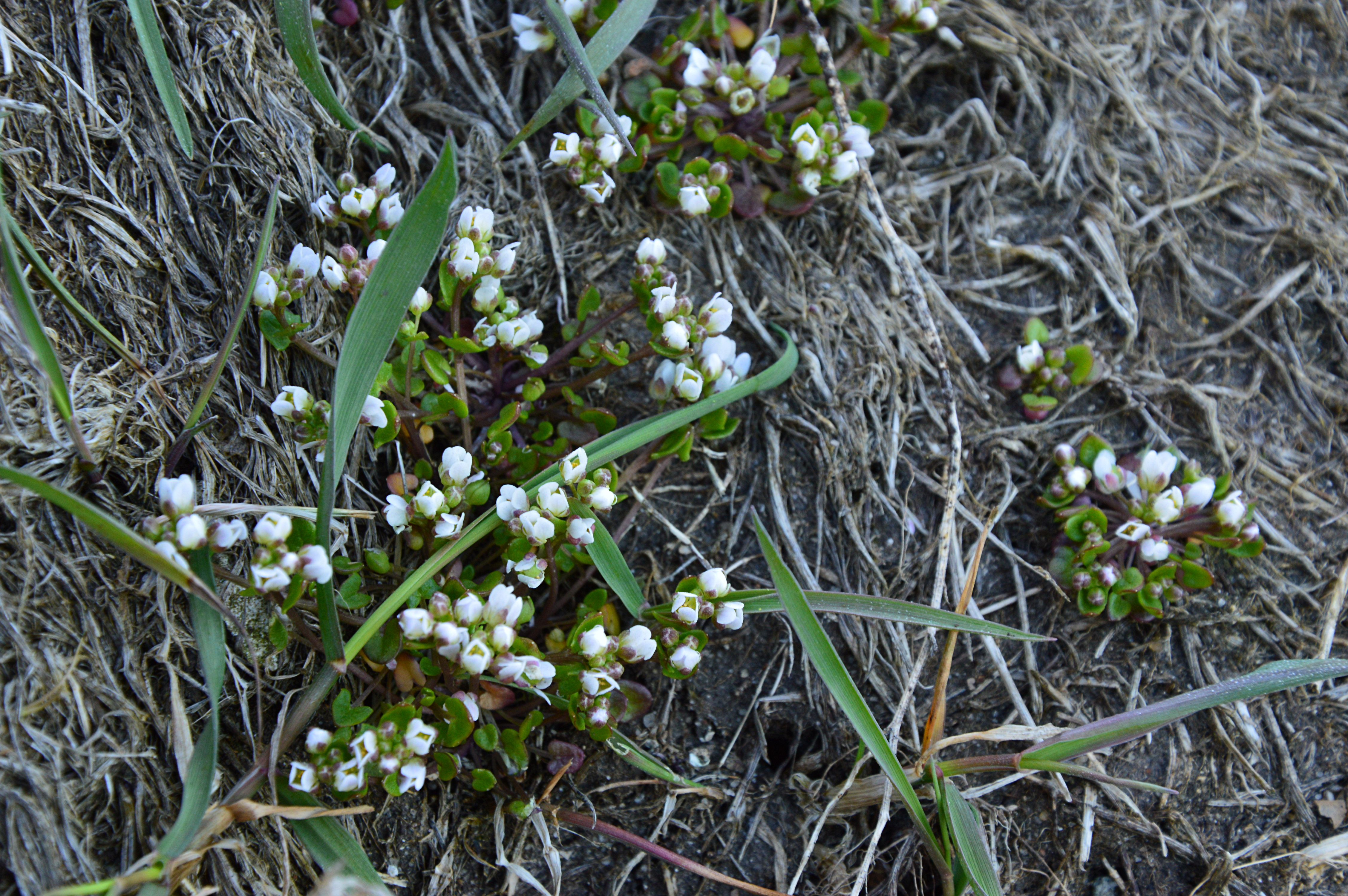 Taani merisalat Osmussaarel.